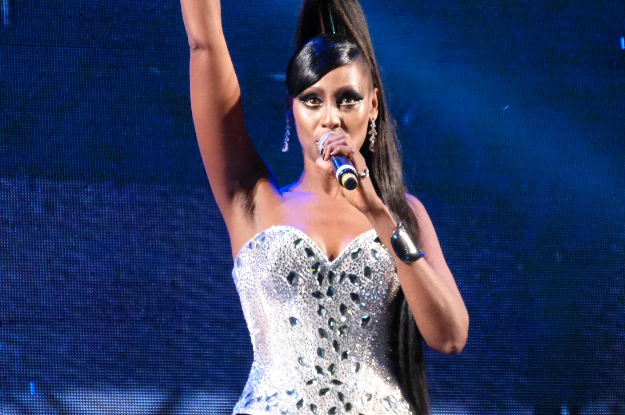 Vale do Anhangabaú - 30/05/2013